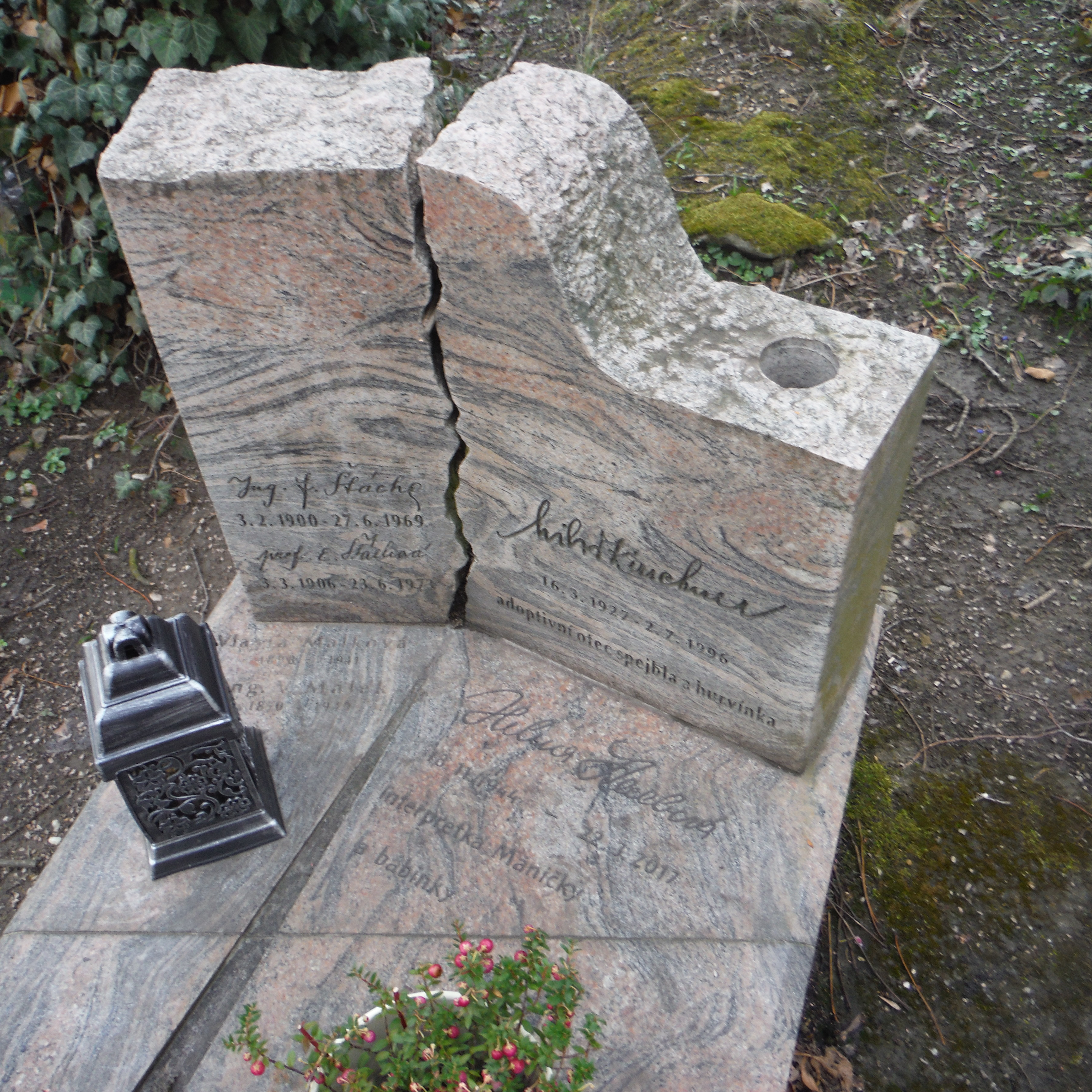 hrob